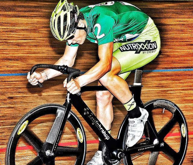 Max Stahr, deutscher Radrennfahrer, bei den deutschen Bahnmeisterschaften 2012 in Frankfurt/Oder